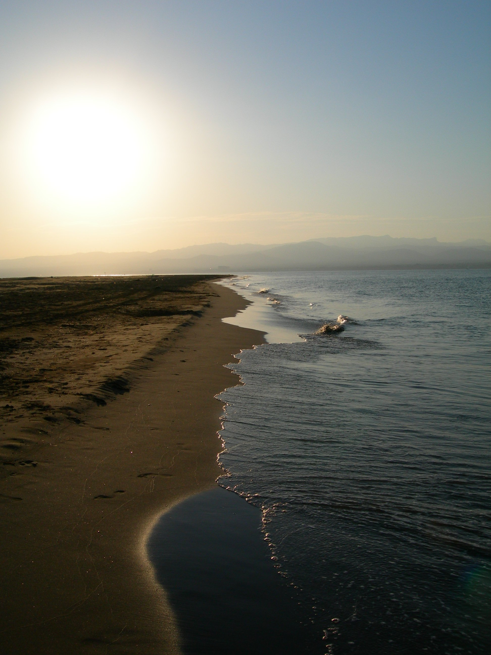 Entre la platja de la Marquesa i la platja del Fangar (Delta de l'Ebre) This is a a photo of a beach in Catalonia, Spain, with id: PL-CT-17003-123